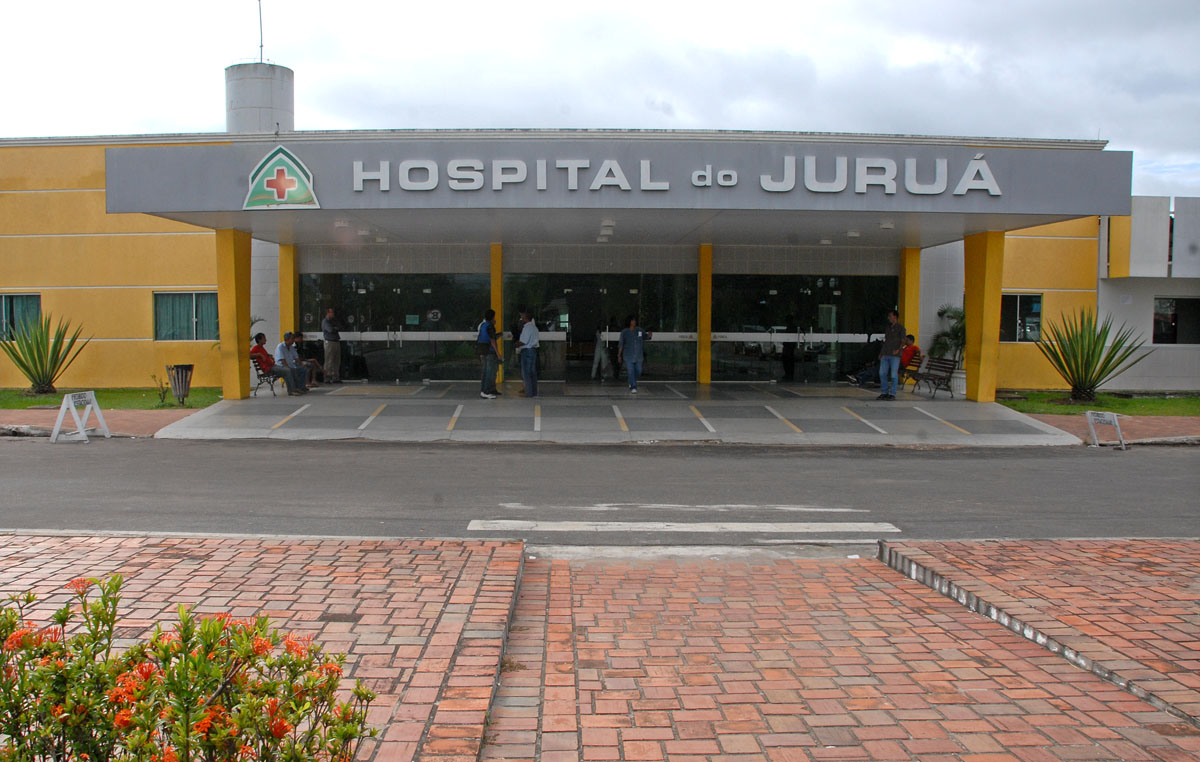 Hospital do Juruá - Cruziero do Sul - Acre